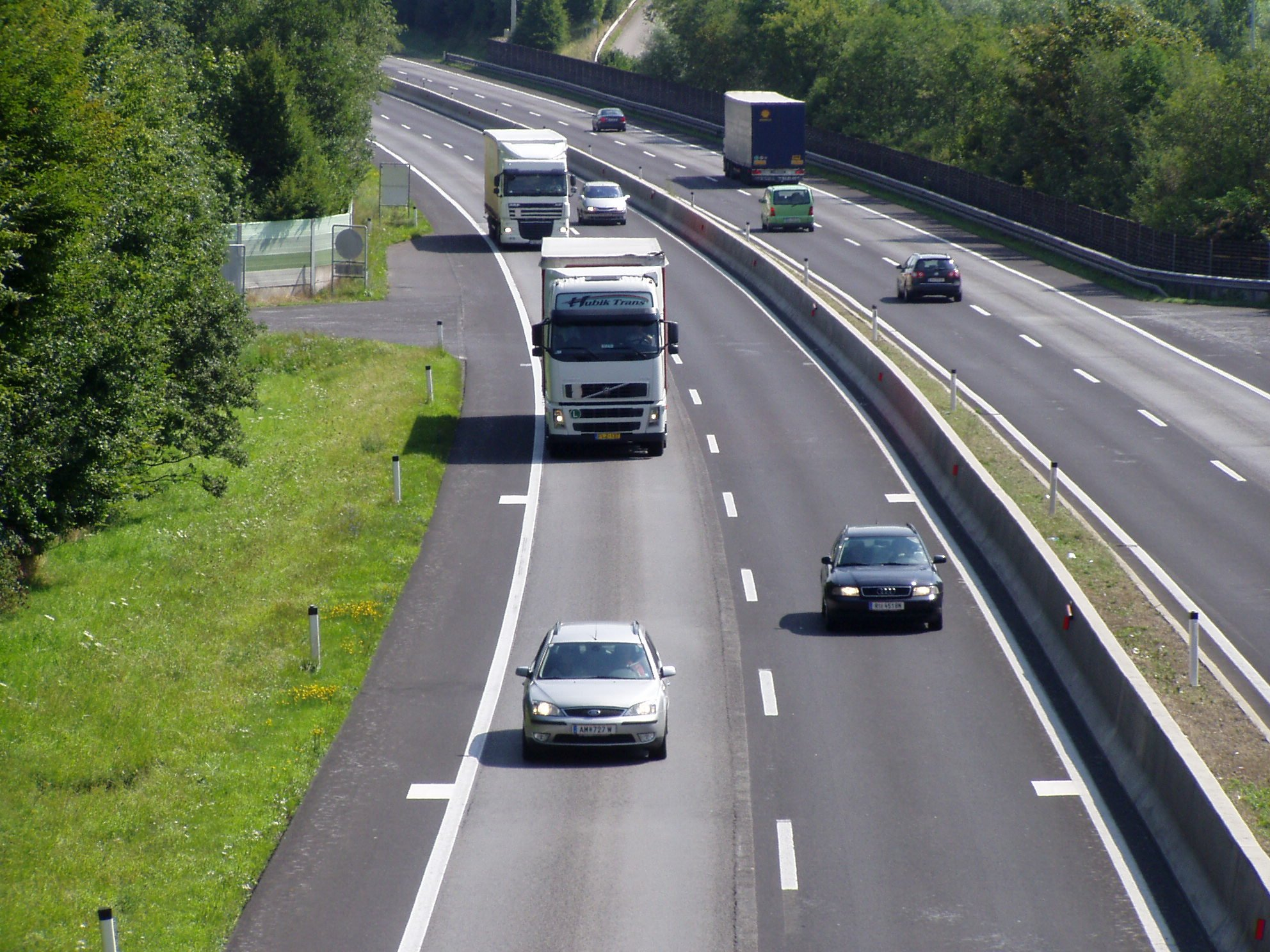 Innkreis Autobahn bei Pichl bei Wels